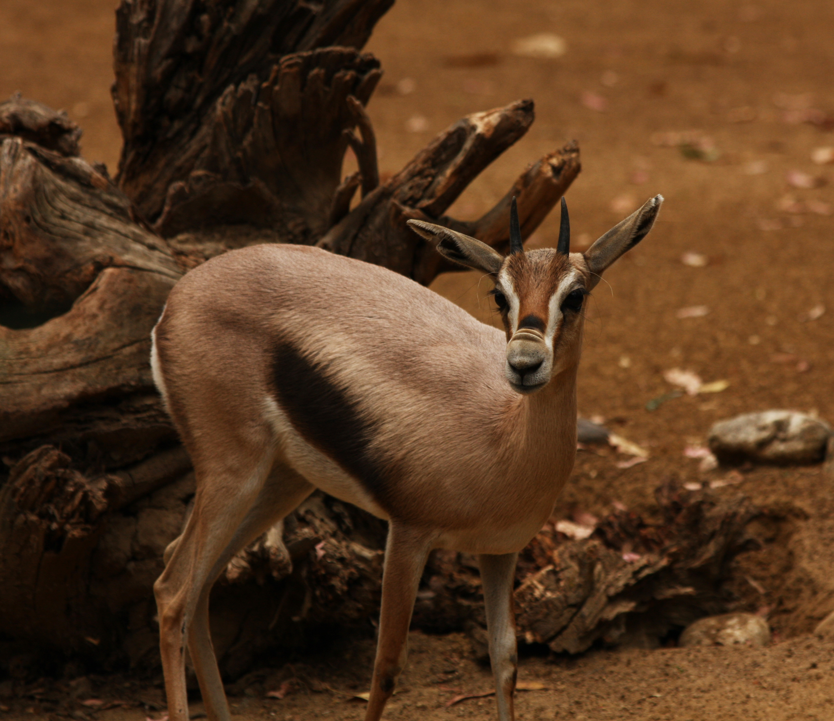 Speke's Gazell (Gazella spekei)